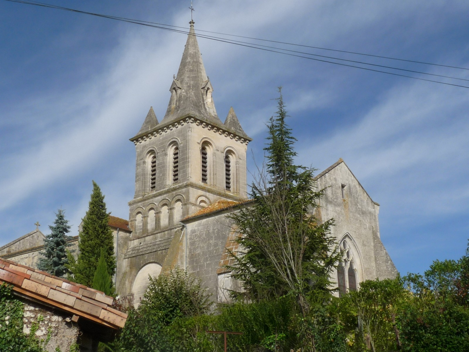 Eglise de Tugéras, Charente-Maritime, France